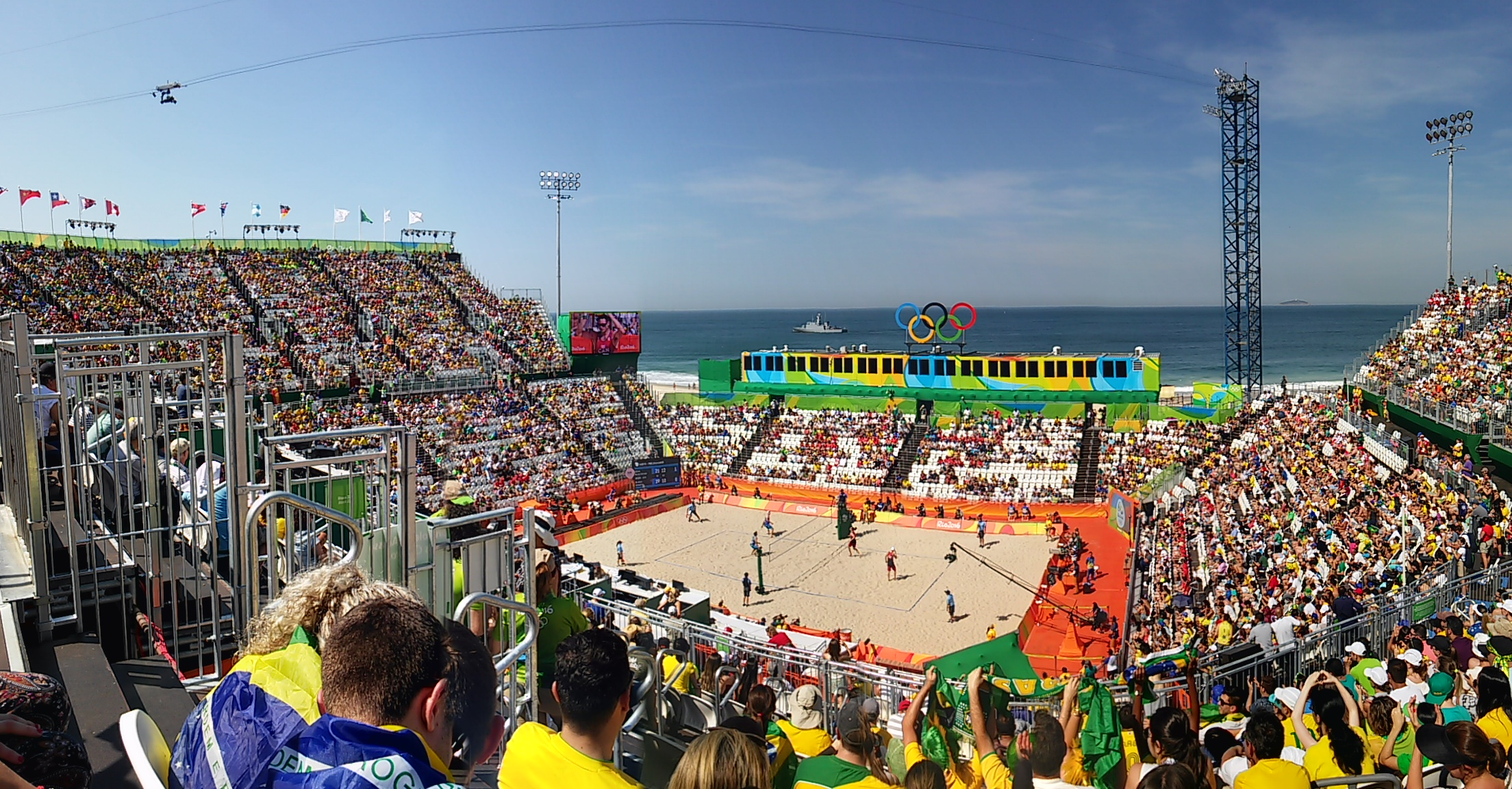 Voley de playa durante Olimpiadas Rio 2016